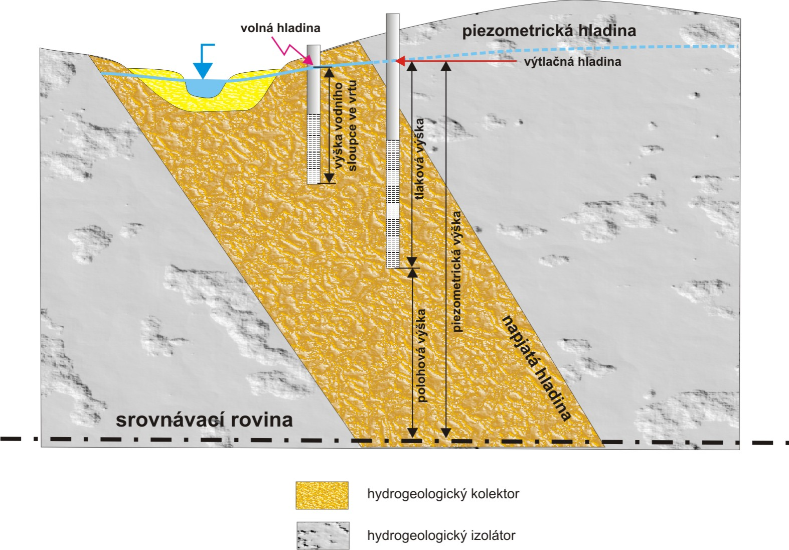 Typy hladin podzemní vody, kategorie hydrogeologie